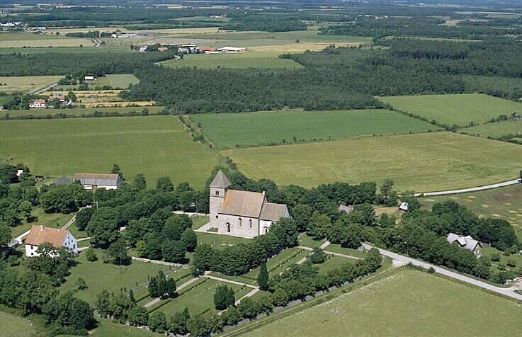 Hablingbo kyrka Motiv: Hablingbo Nyckelord: Flygbilder, Riksintressen Kategori: KyrkomiljöHablingbo kyrka.